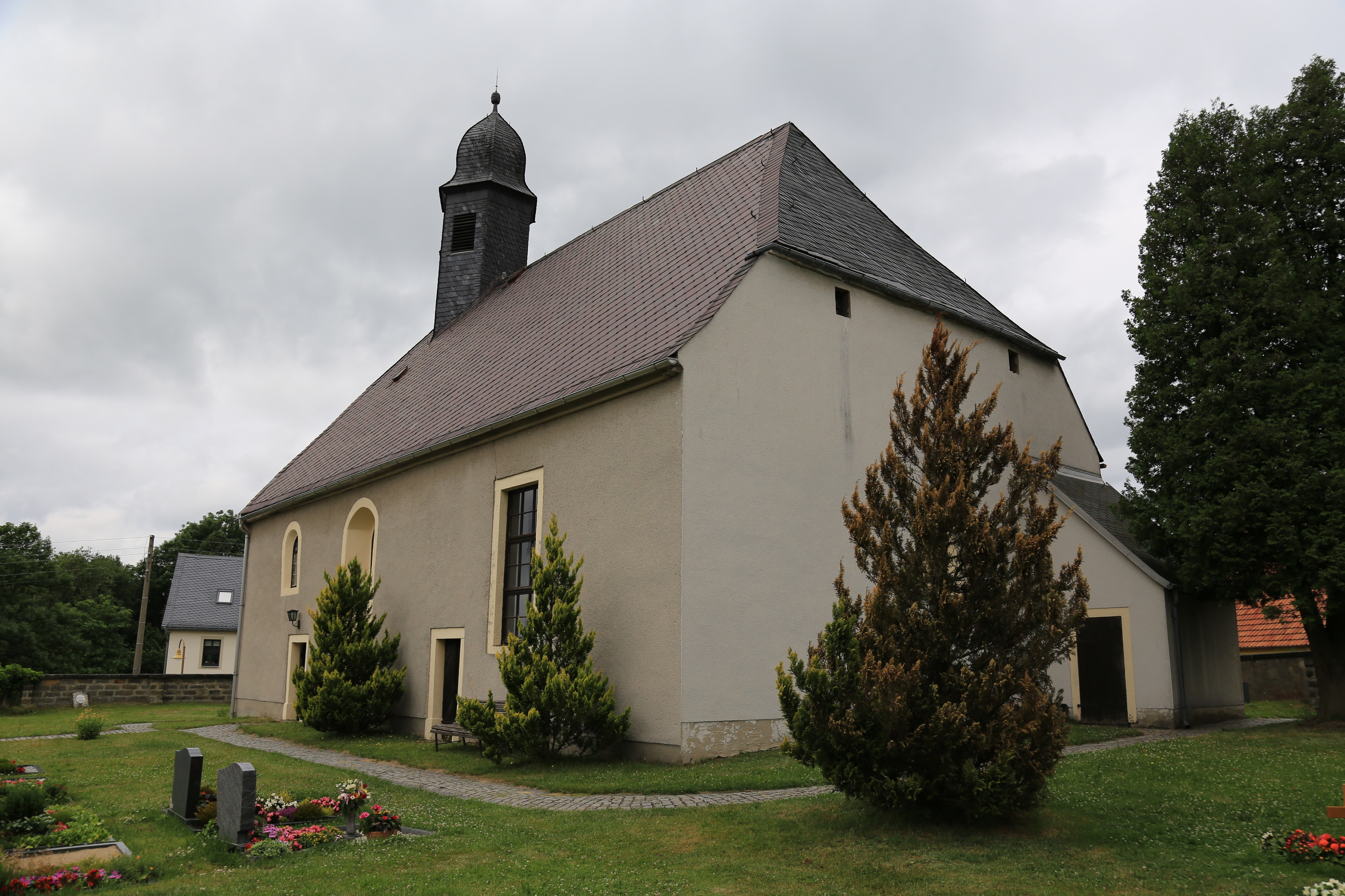 Kirche Rückersdorf Juni 2017 (1)